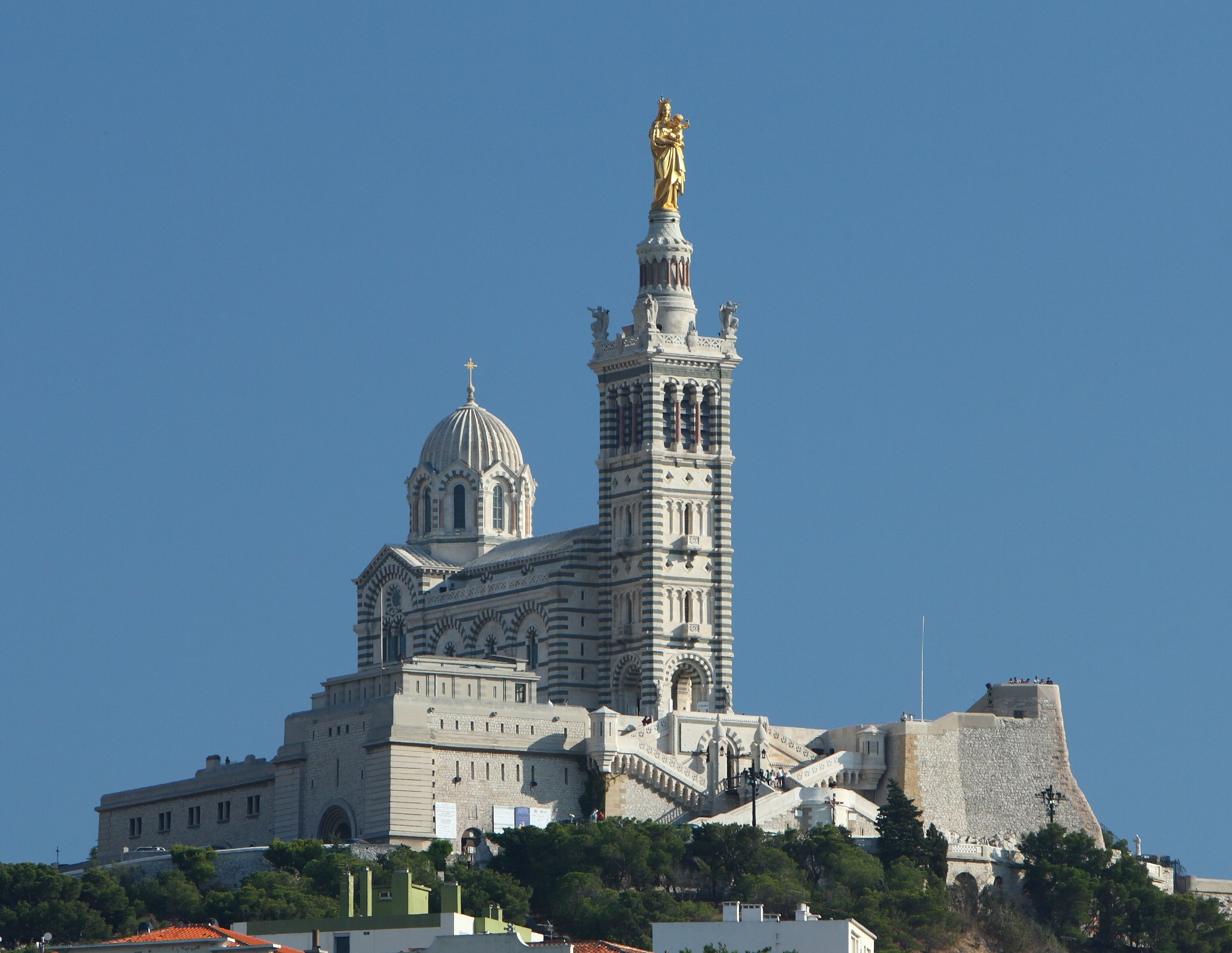 Basilique Notre-Dame de la Garde, Marseille, FRANCE